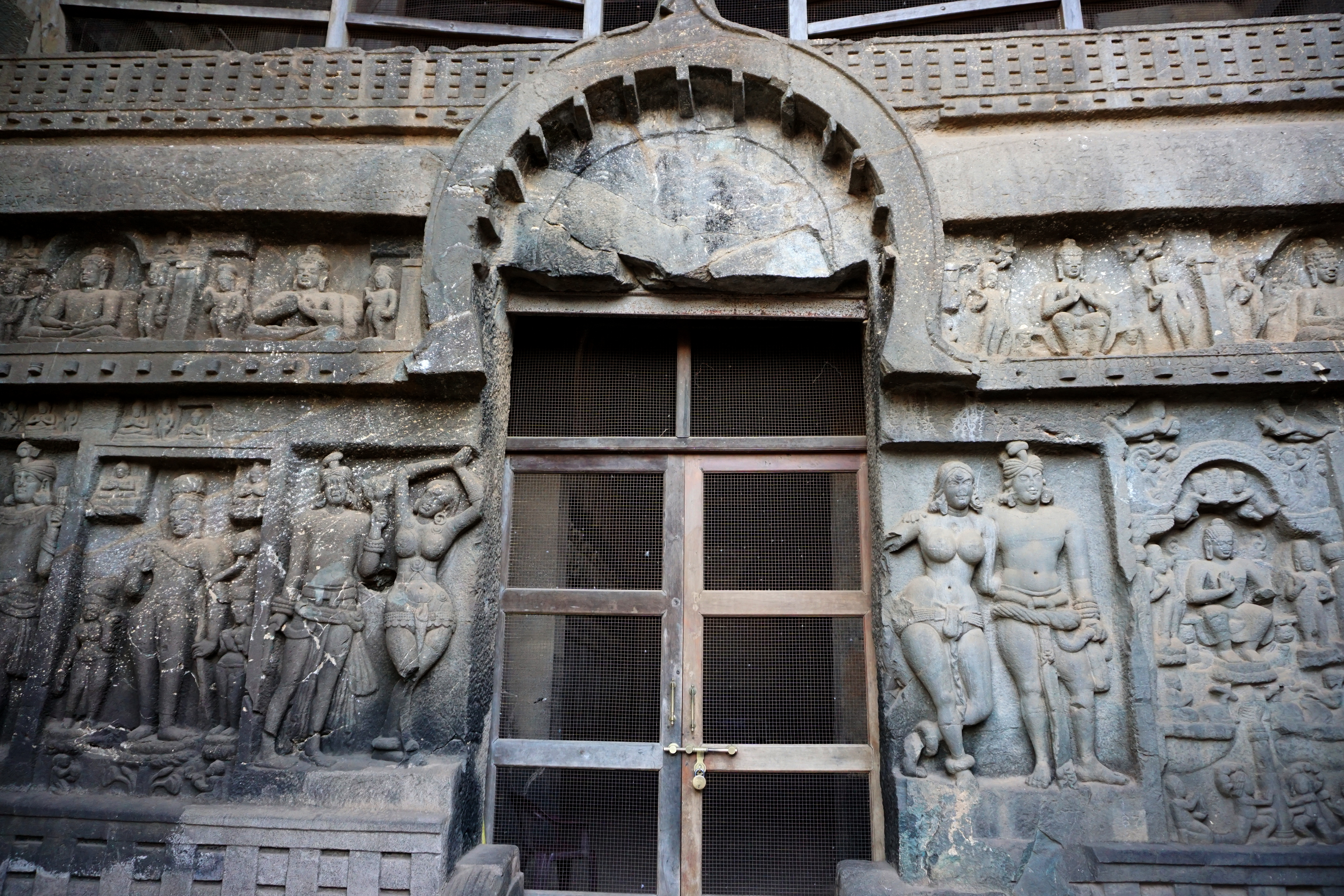 Karle Caves, Lonavala, India